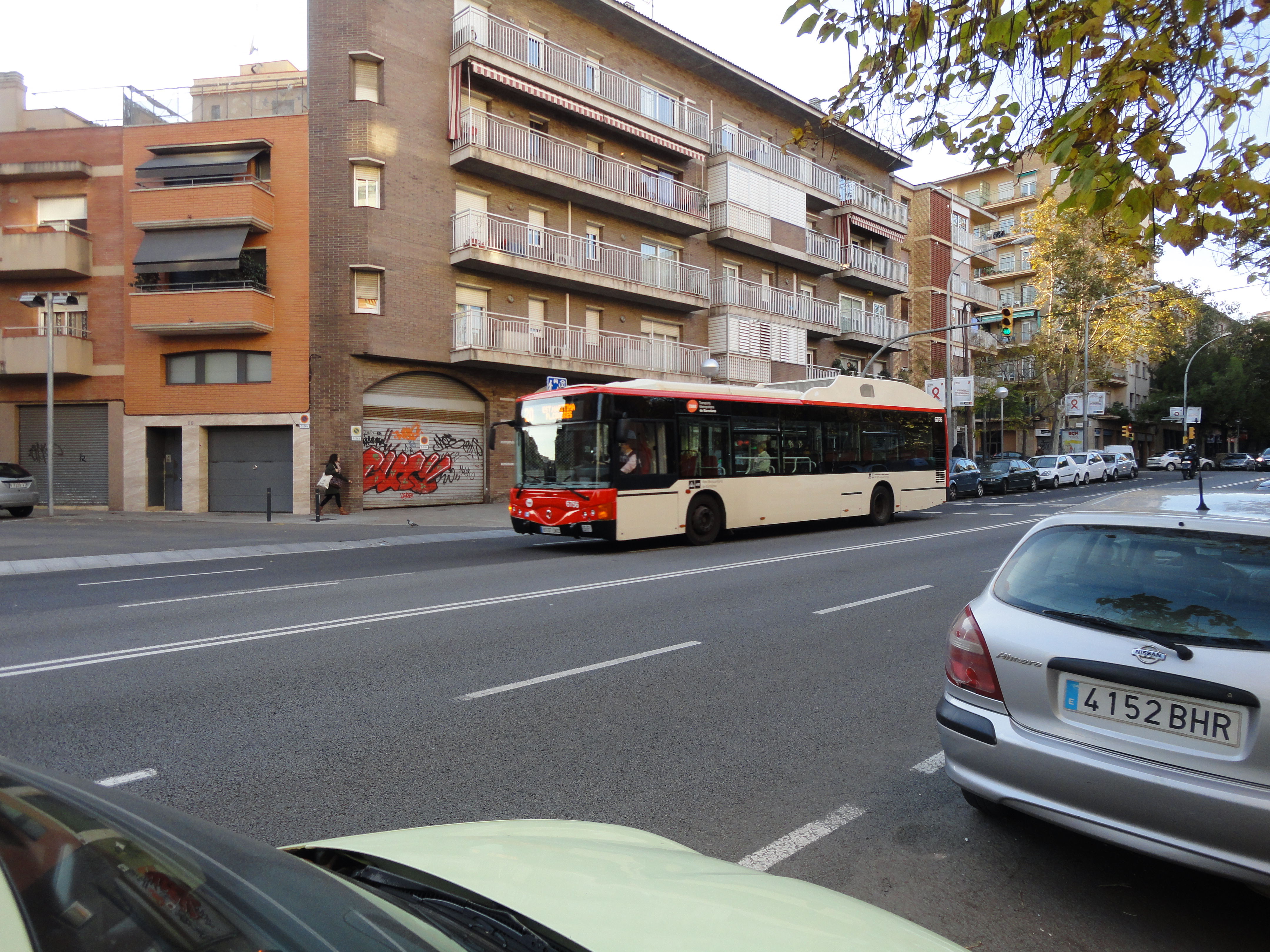 Autobús de la línia 20.